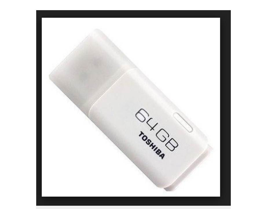 64 GB